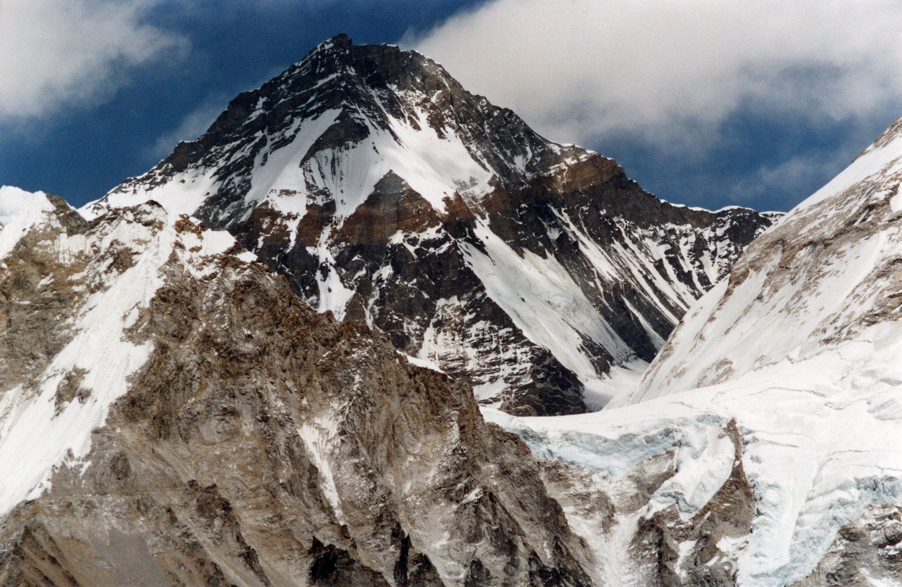 Changtse-from-KalaPattar